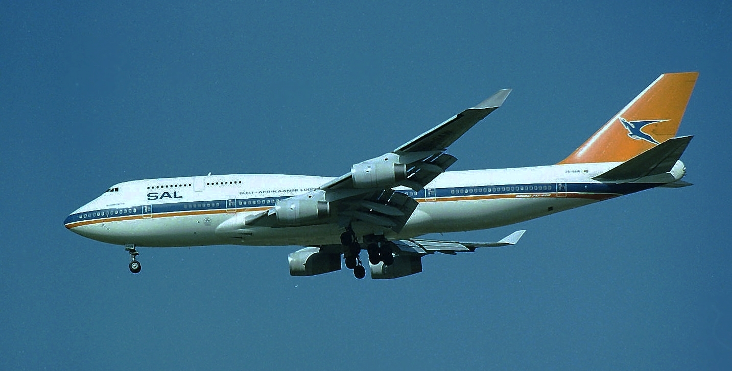 SAA B747-444 ZS-SAW